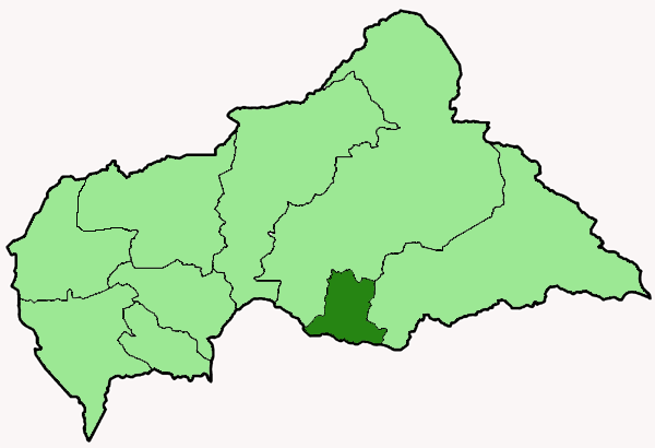 Mappa della diocesi cattolica di Alindao, nella Repubblica Centrafricana. ANno 2009.